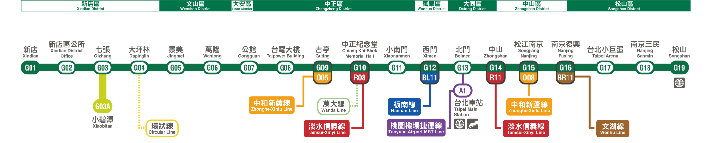 中文（台灣）: 台北捷運松山新店線(2017-11-22)